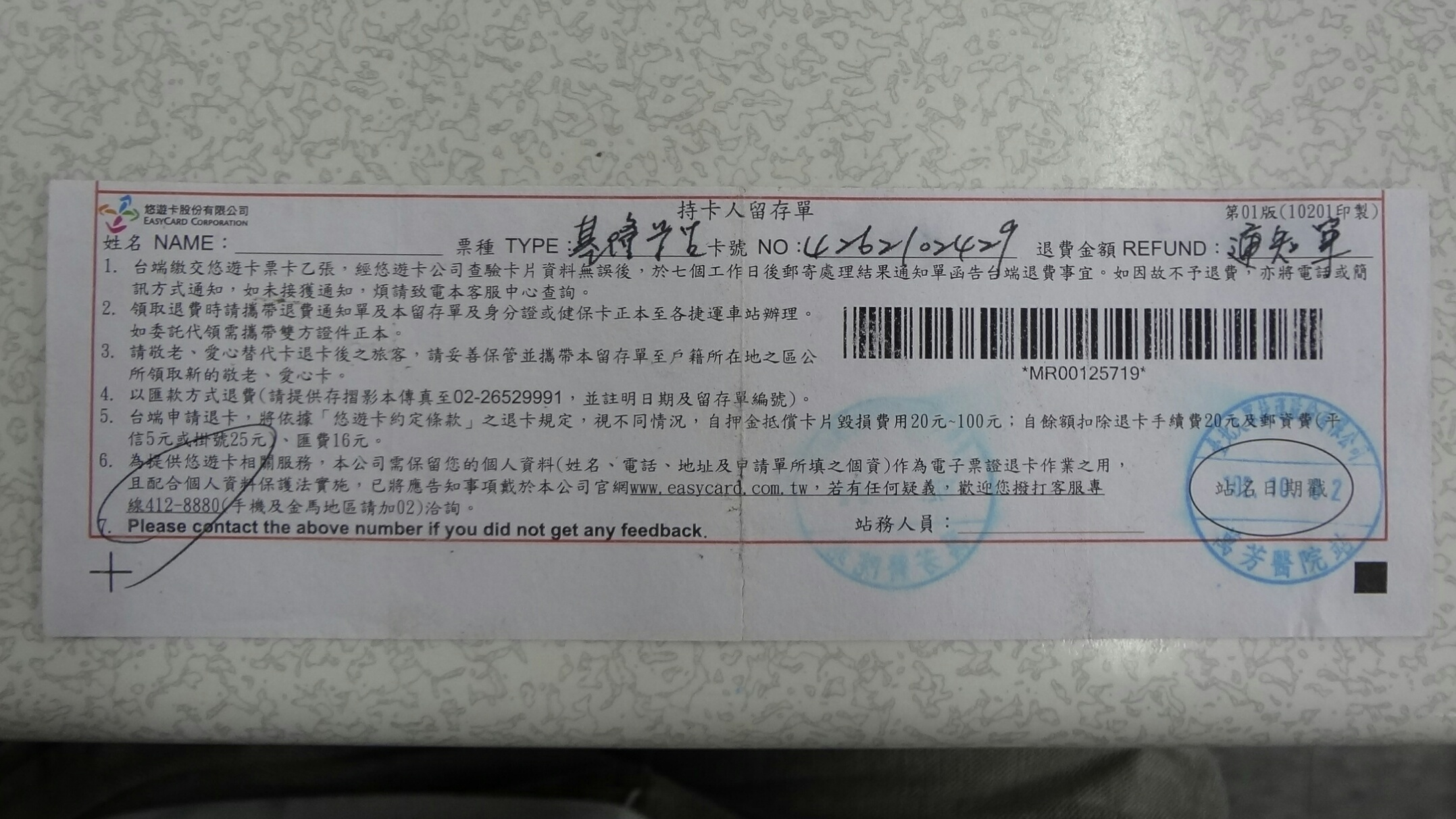 悠遊卡退費持卡人留存單